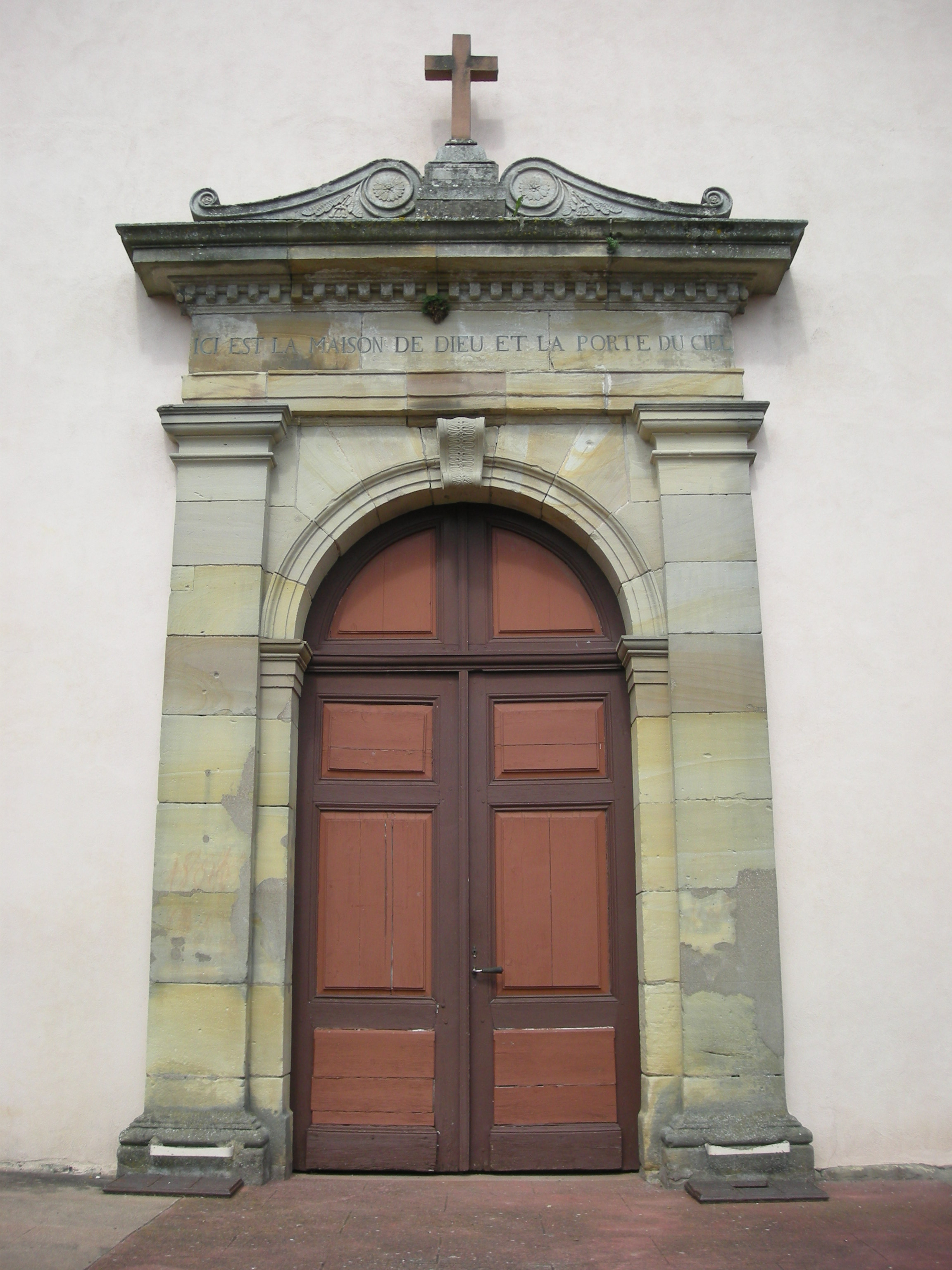 Portail de l'église (19e s.) à Glonville (Meurthe-et-Moselle)